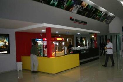 Vista lateral da entrada do Cine Laser Vilhena